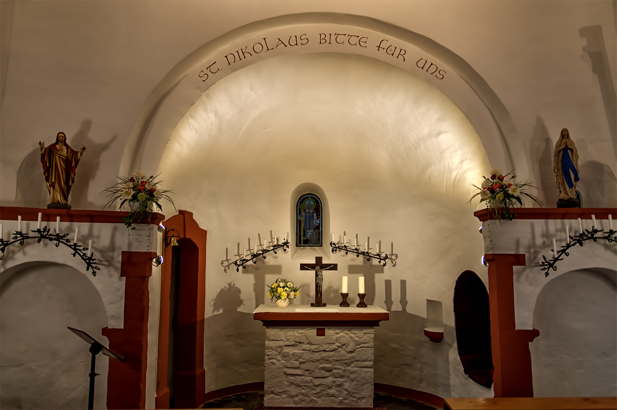 Die römisch-katholische Nikolauskapelle in Geich, eines der ältesten historischen und kirchlichen Baudenkmäler des Kreises Düren, stammt aus dem 12./13. Jahrhundert. Sie ist unter der Nr. 25 in der Liste der Baudenkmäler in Langerwehe eingetragen. Die Kapelle gehört zur Pfarrgemeinde St. Michael, Echtz.